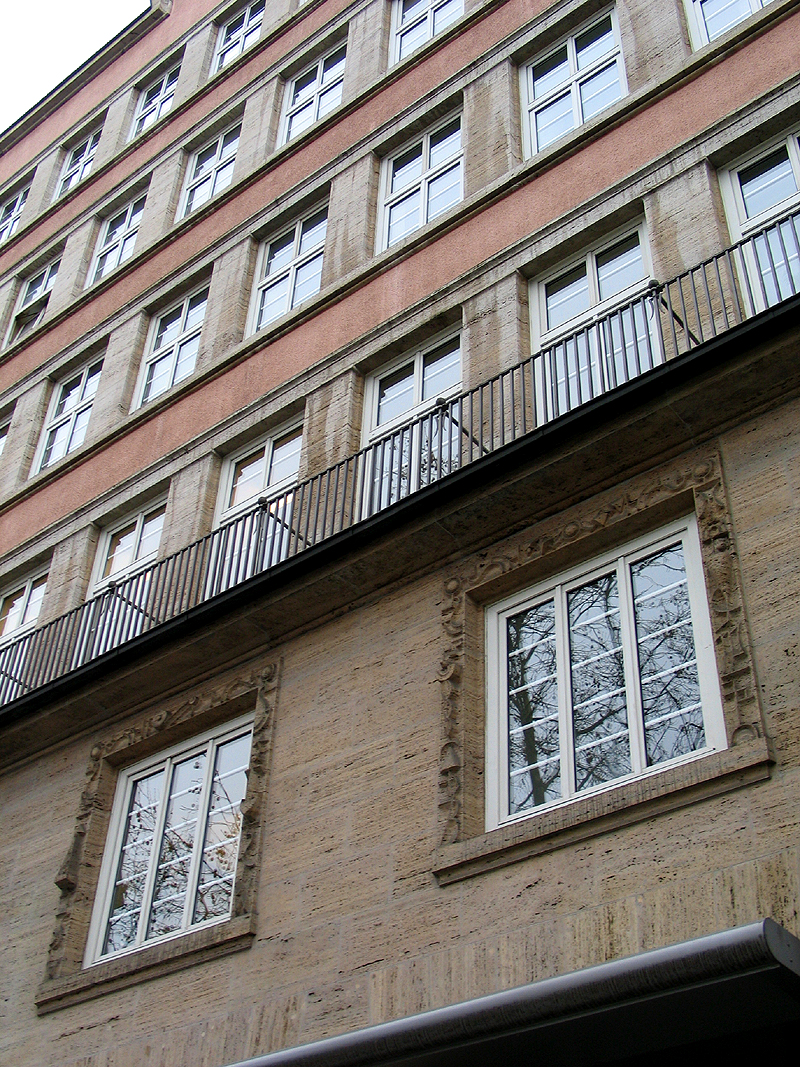 Die abstrakte und stilisierende Bauplastik am 1927 errichteten Kurierhaus entwarf der Bildhauer Ludwig Vierthaler, möglicherweise gemeinsam mit Paul Brasack ...